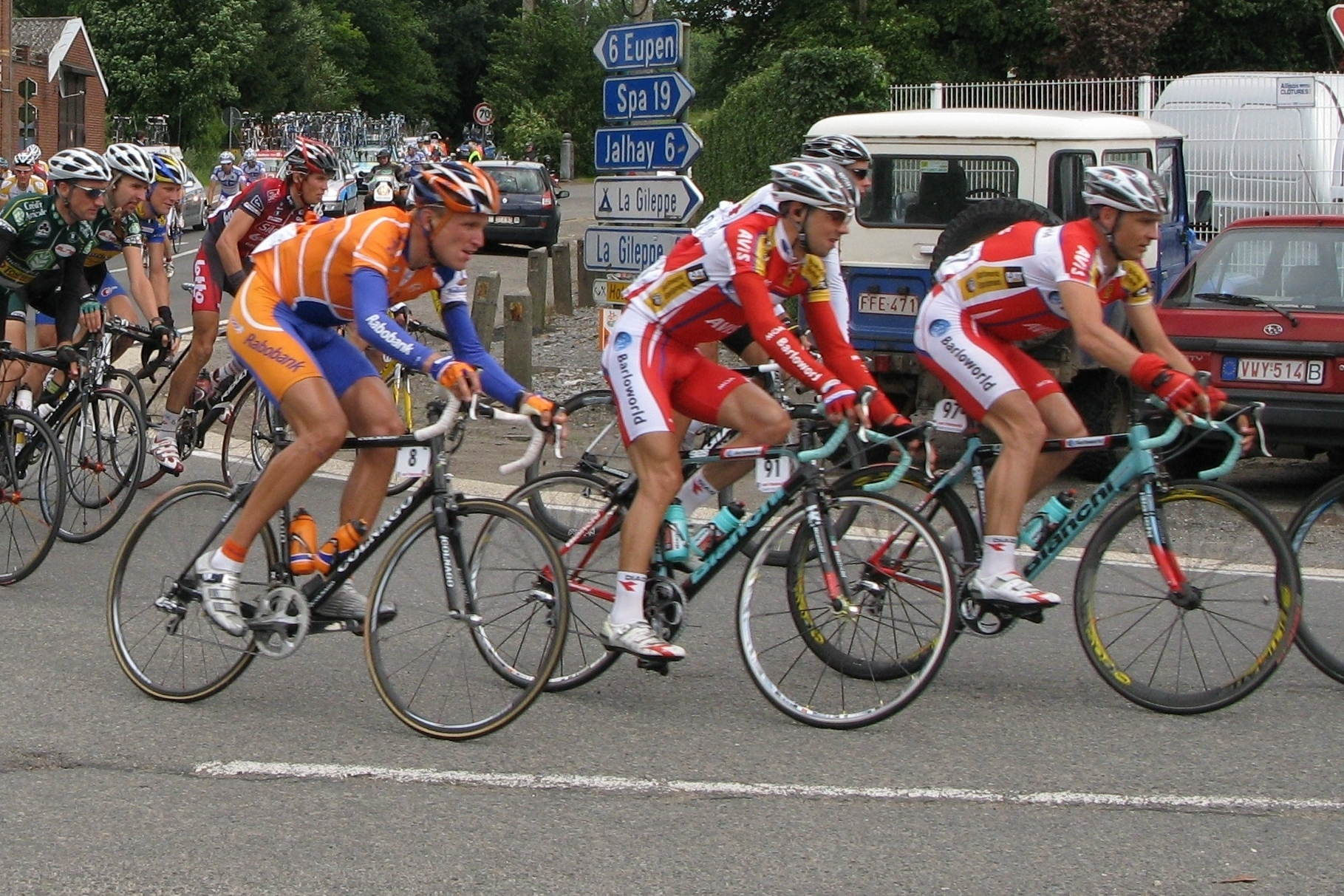 De Joost Posthuma (8 Rabobank), John-Lee Augustin (91 Barloworld), Robert Hunter (97 Barloworld), bei der Ster Elektrotoer 2008 zu Baelen. Kategorie:Vëlossportler